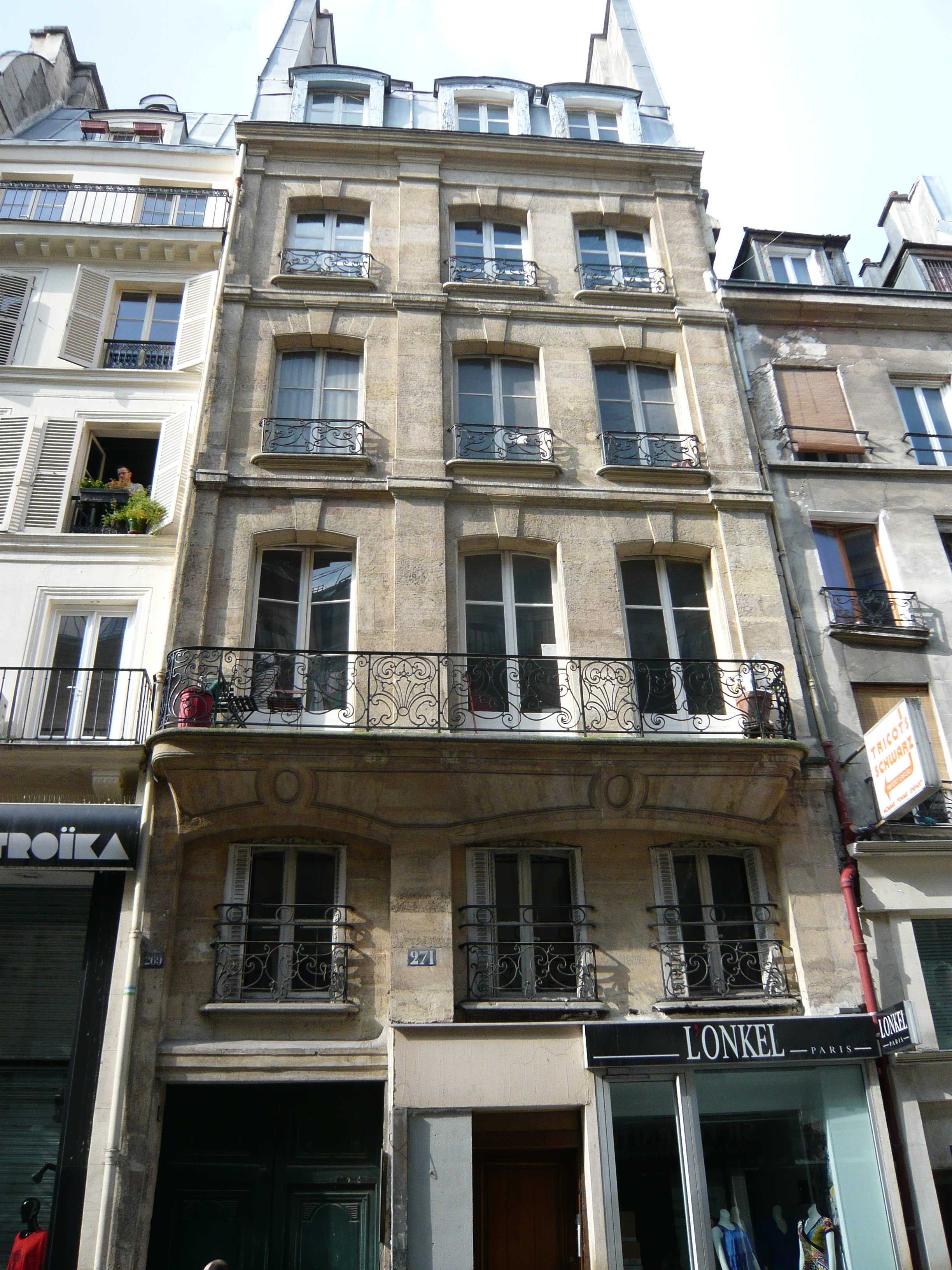 Ancien bureau des brodeurs et coffretiers 271 rue St-Denis Paris 2e